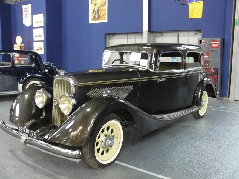 Retromobile 2012